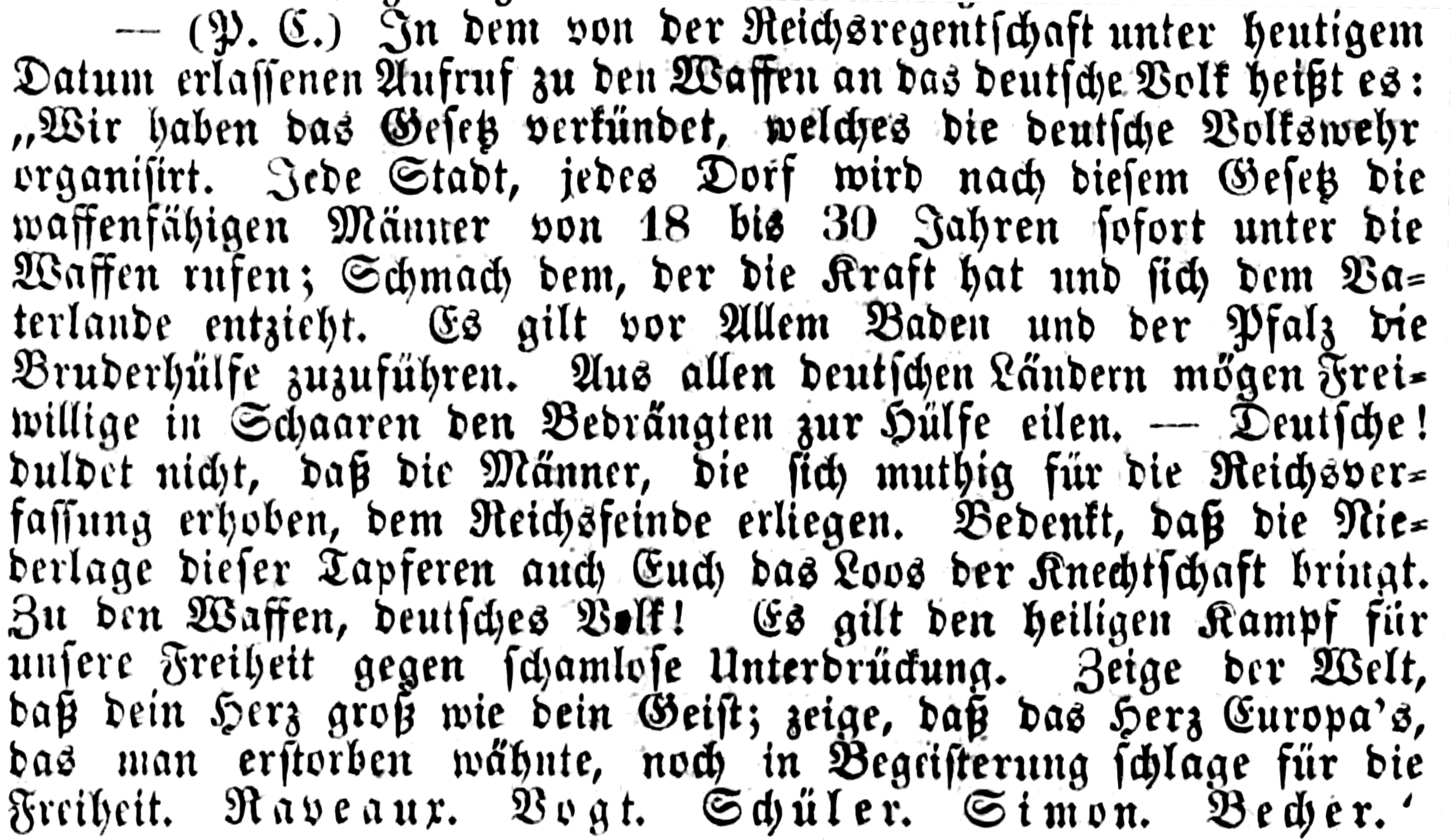 Aufruf "Zu den Waffen" der Reichsregentschaft 1849 (Zeitungsauszug)